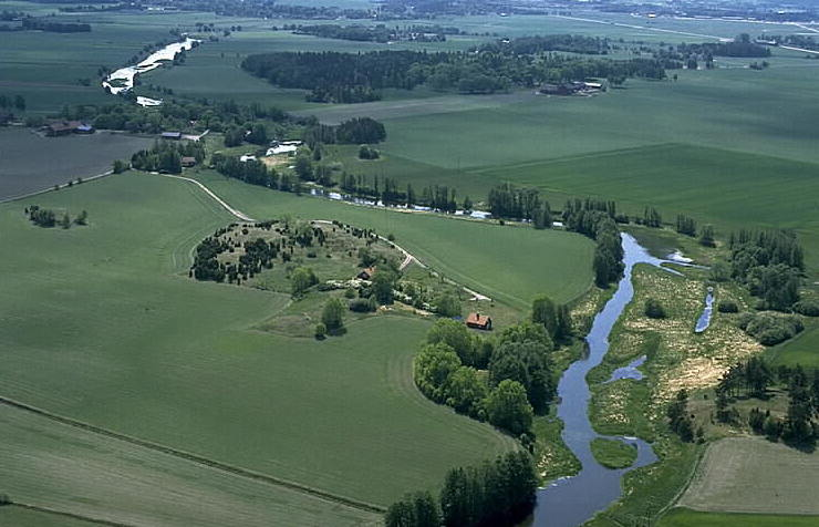 Fyrisån samt båtgravfältet (i bildens mitt). Motiv: Valsgärde Nyckelord: Flygbilder, Riksintressen Kategori: Miljöer, Odlingslandskap Fyrisån samt båtgravfältet (i bildens mitt).